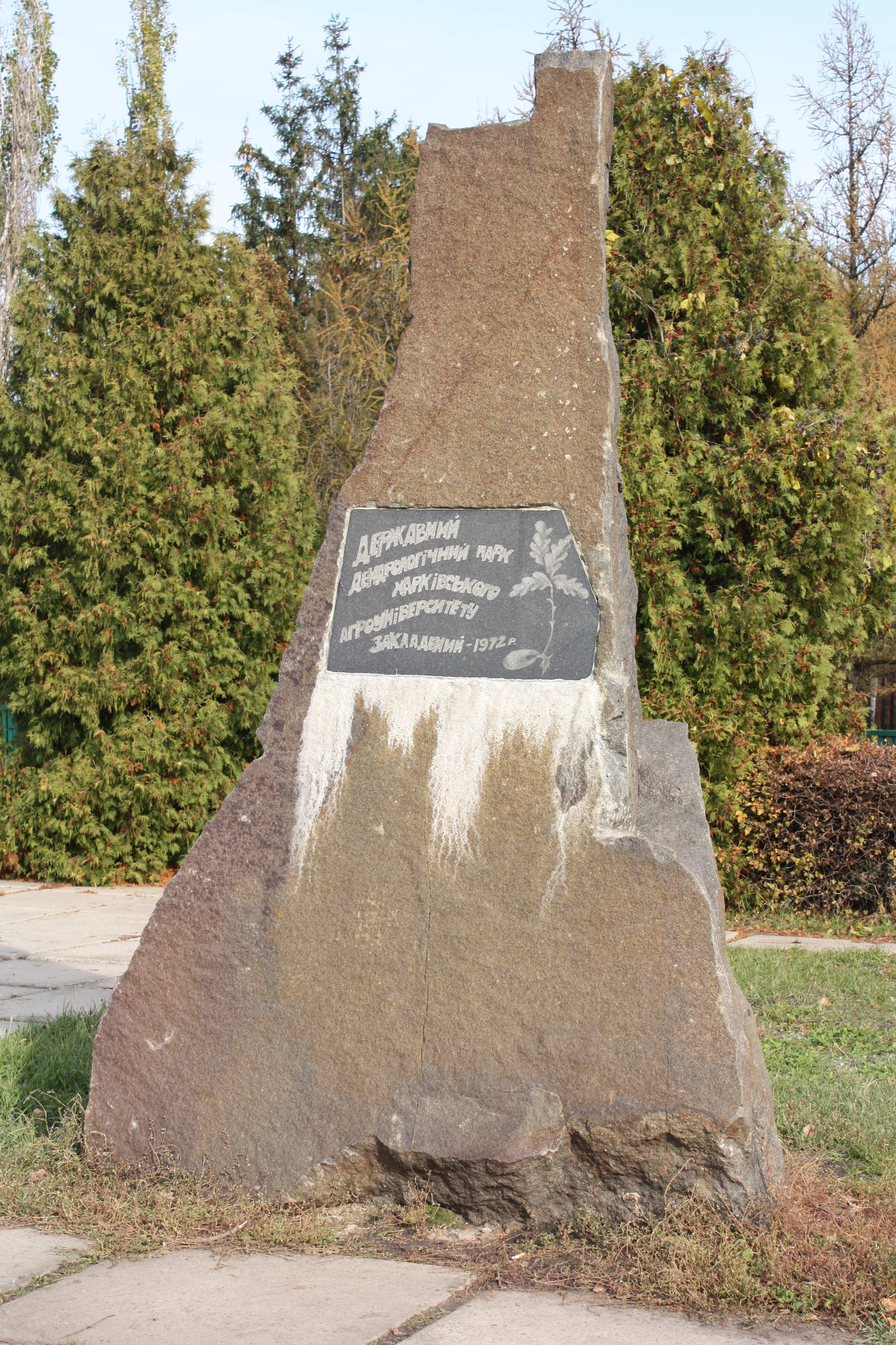 Дендрологічний парк Харківського національного аграрного університету ім. В. В. Докучаєва